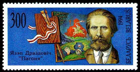 Беларуская (тарашкевіца): Язэп Драздовіч. Белпошта